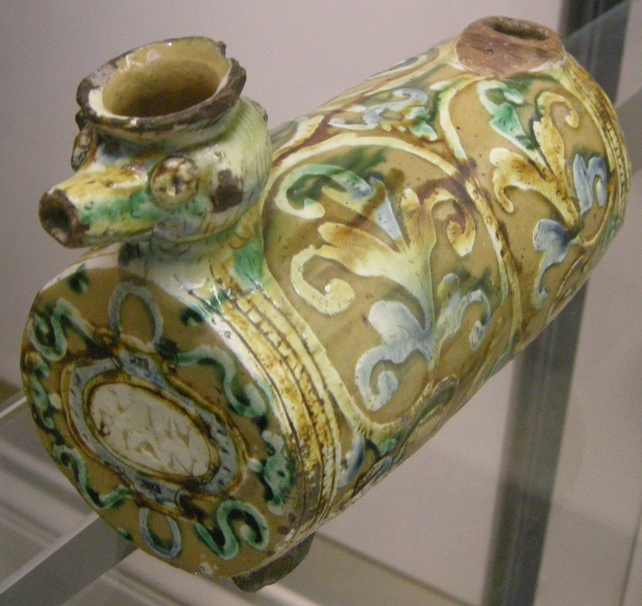 Venezia, contenitore per oleum e azeto, 1525